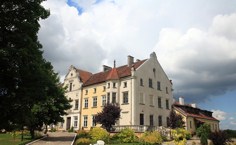 Łabędnik – wieś w woj. warmińsko-mazurskim, w powiecie bartoszyckim, w gminie Bartoszyce